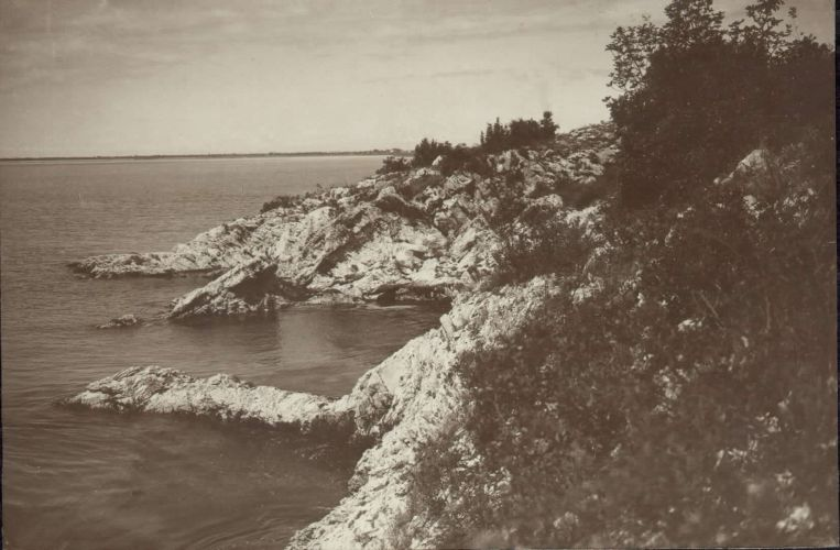 Morska obala